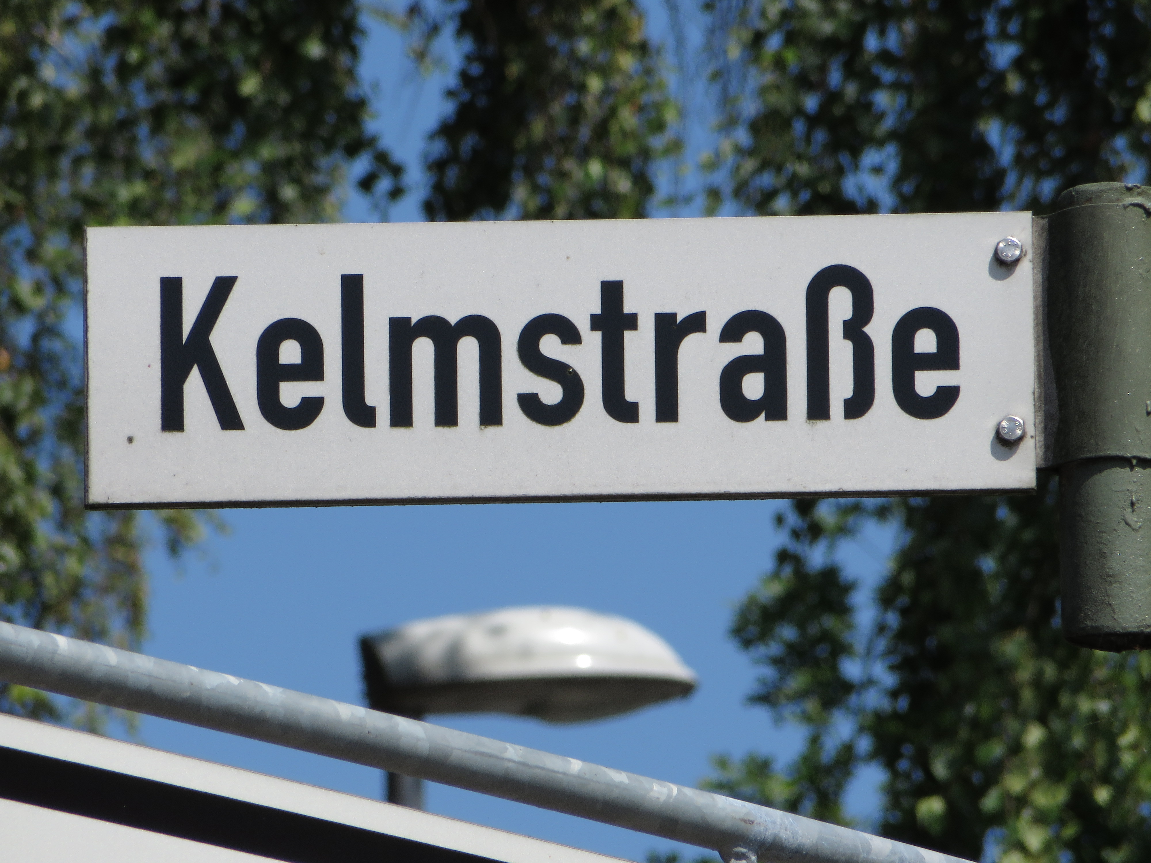 Straßenschild Kelmstraße (Flensburg 2014)